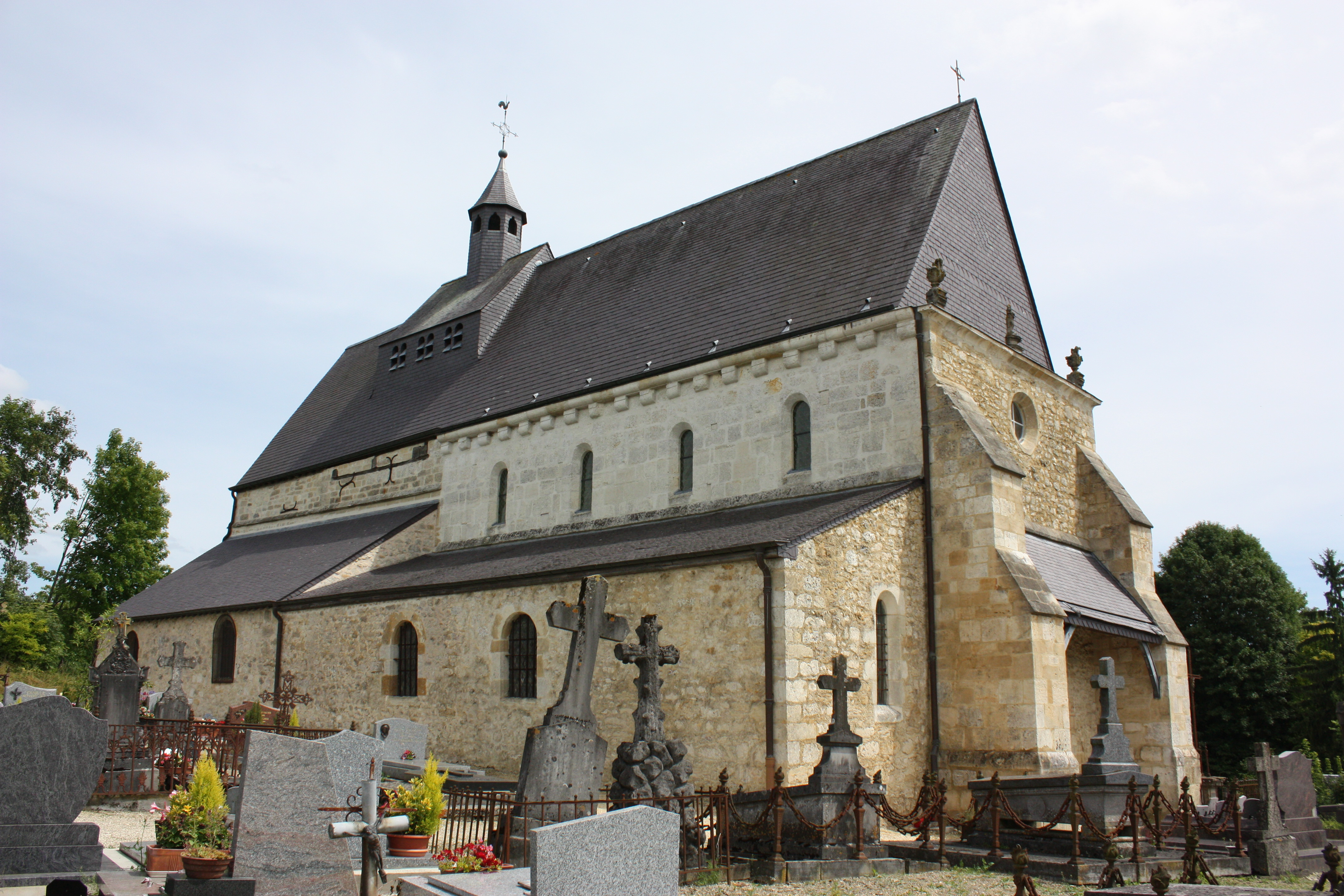 Village Ardennais